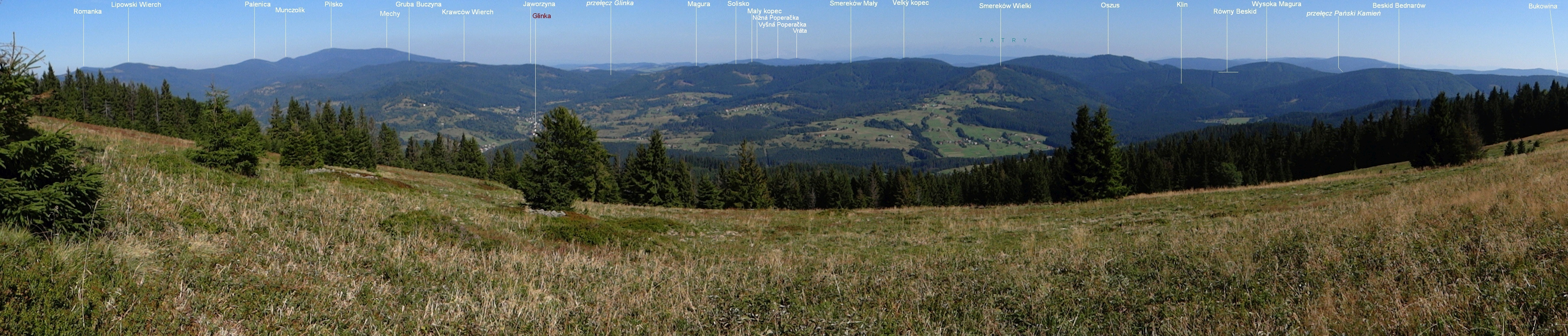 Panorama widokowa z Hali na Muńcole